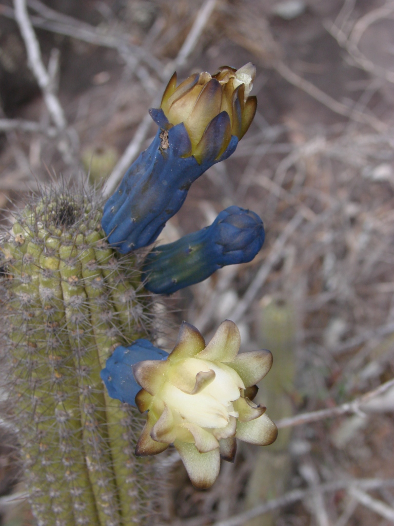 Cipocereus minensis (Werderm.)Ritter - CACTACEAE - Parque Estadual do Biribiri - Serra do Espinhaço - Diamantina - Minas Gerais - Brasil.